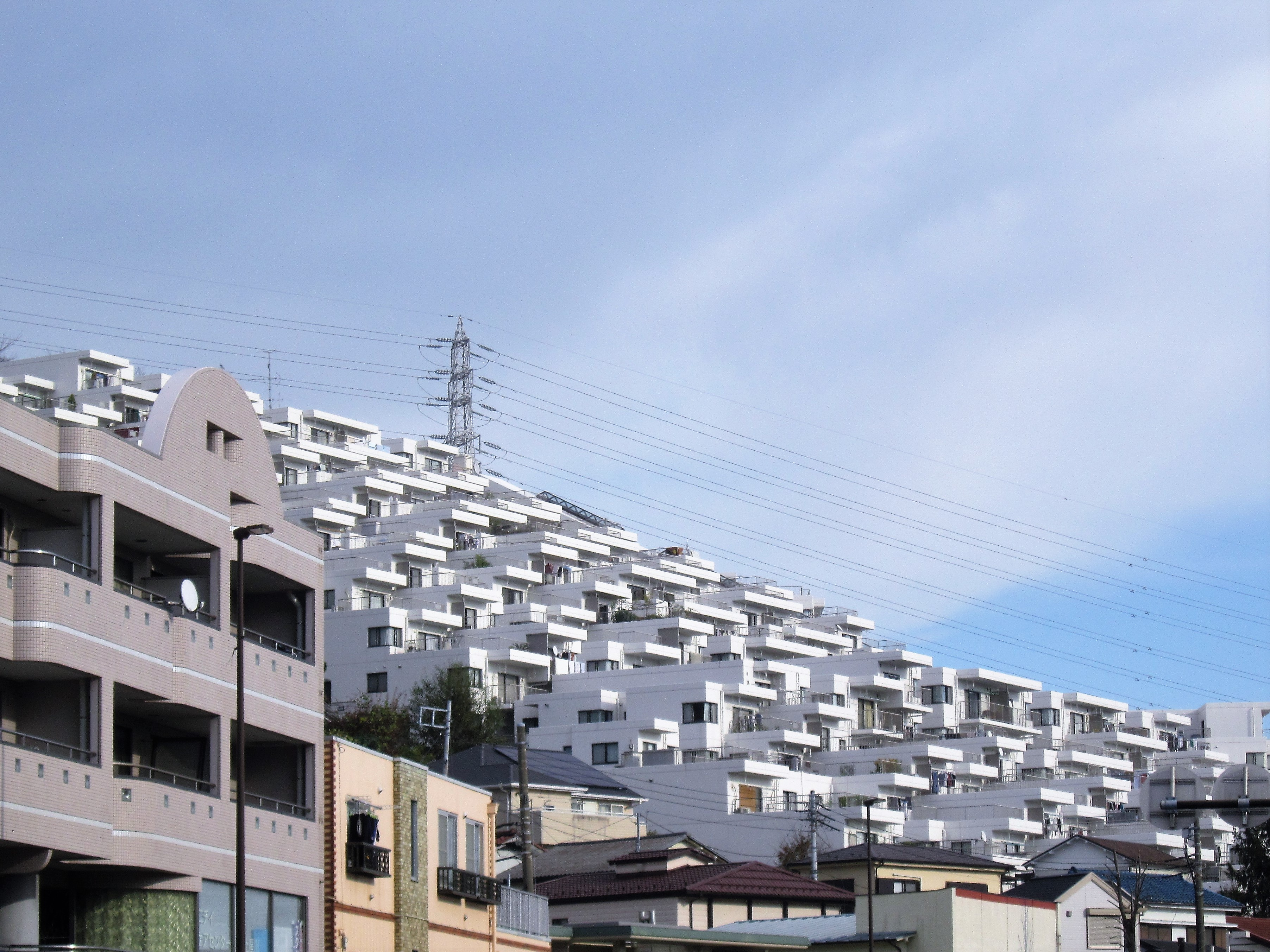 ルネ上星川（横浜市保土ケ谷区釜台町）斜面に建つマンション